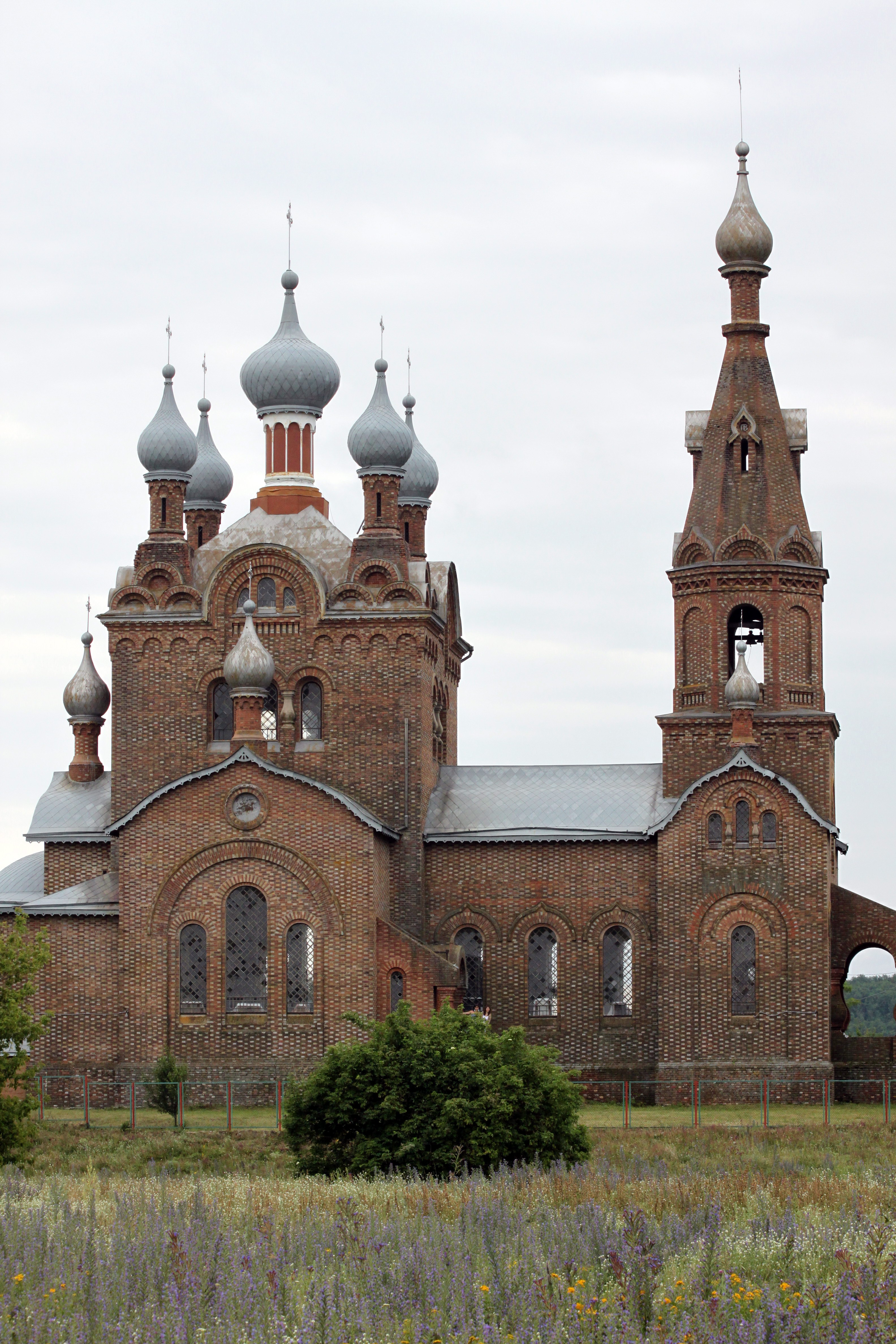 Церква Покровська, с. Покровка, Любашівський район